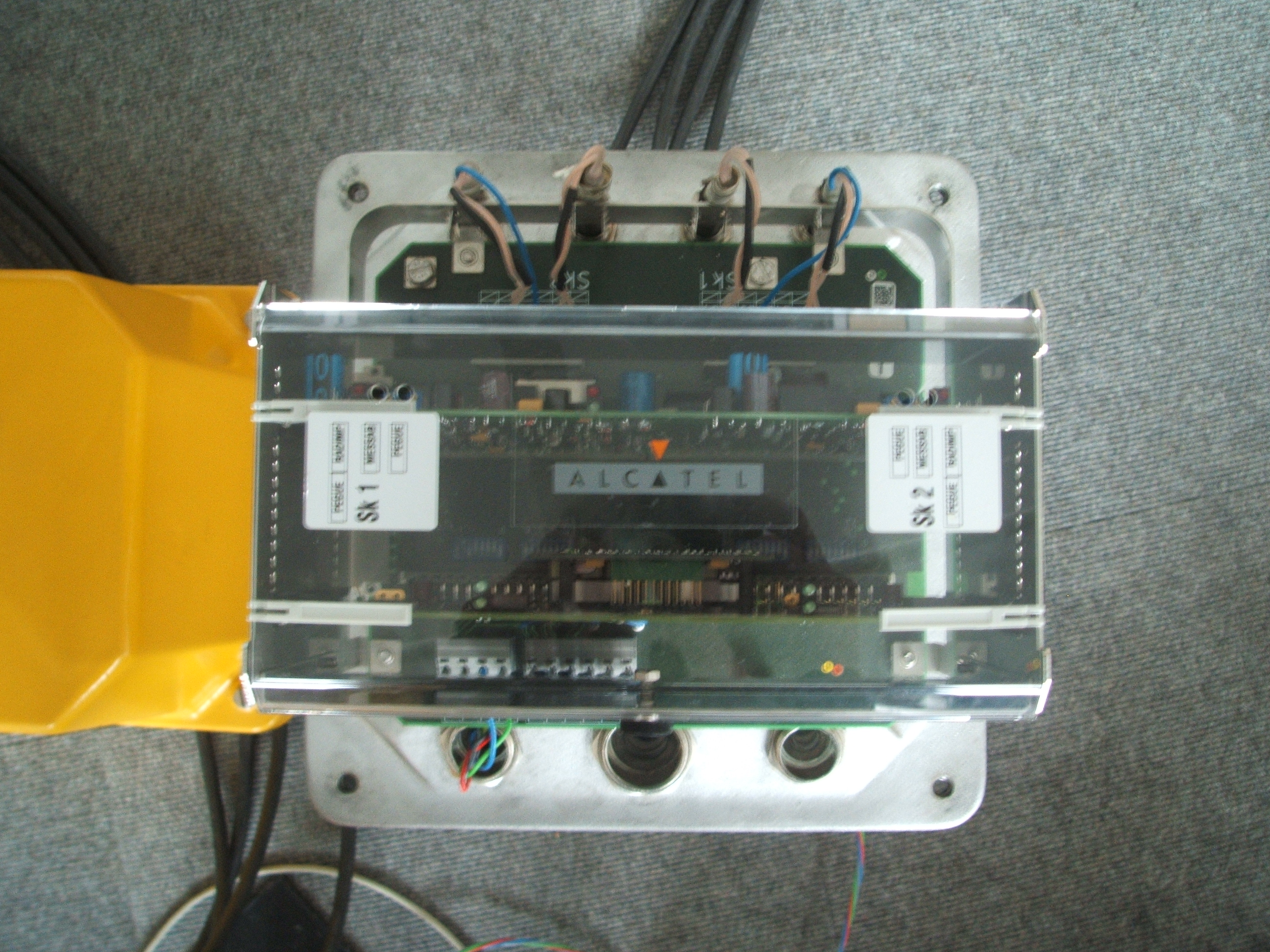 ALCATEL, Schaltkasten eines Achszählpunktes Zp 30H offen